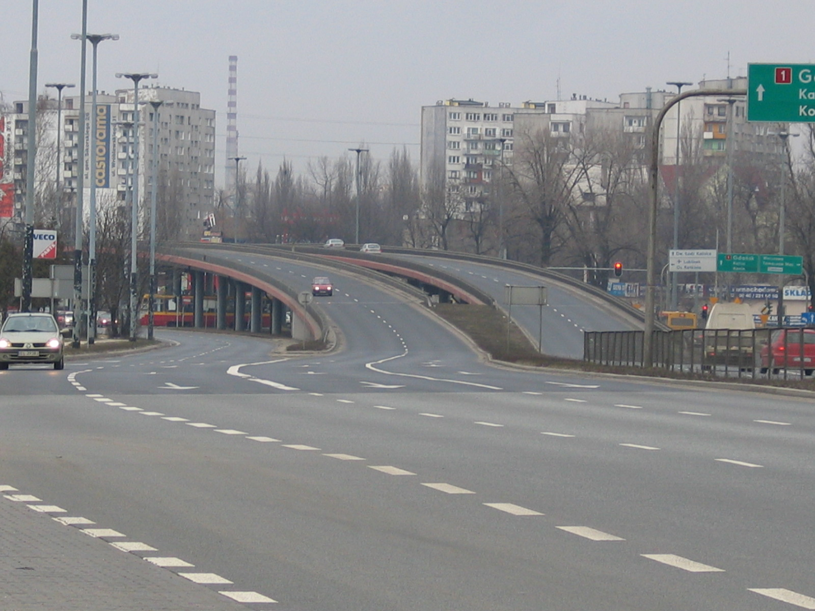 Estakada w Łodzi